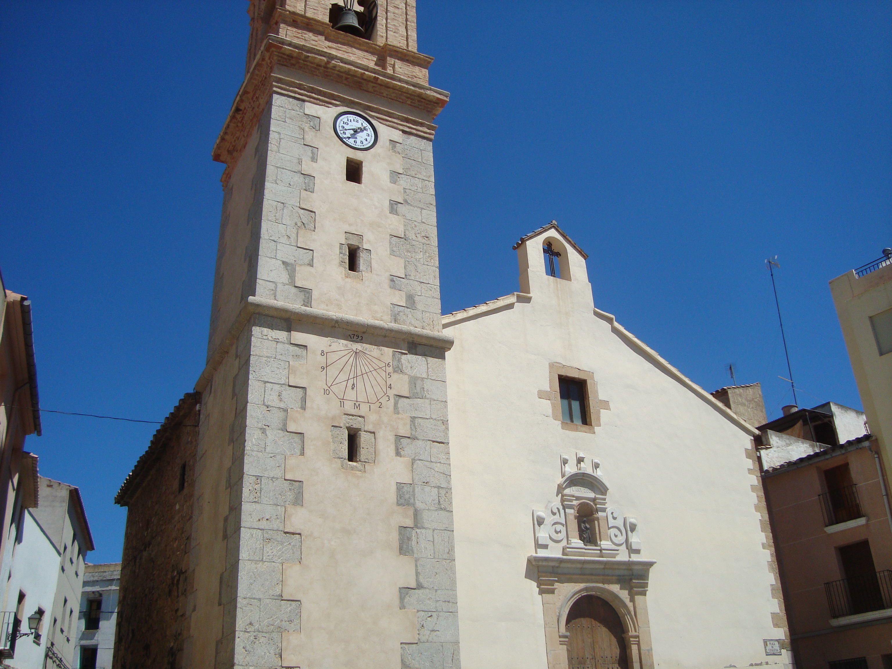 Església parroquial de Sant Mateu (Figueroles) 04.060-001.